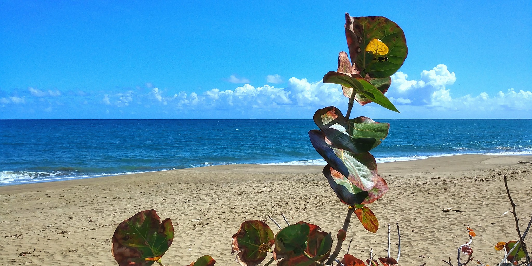 Playa Parchola, Dorado, Puerto Rico (2018)